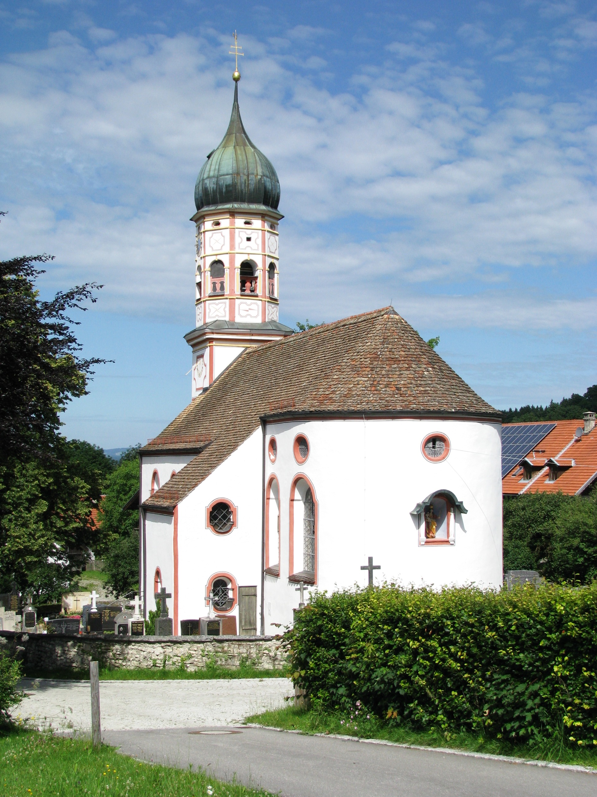 Kath. Pfarrkirche St. Georg in Aidling, Gemeinde Riegsee.